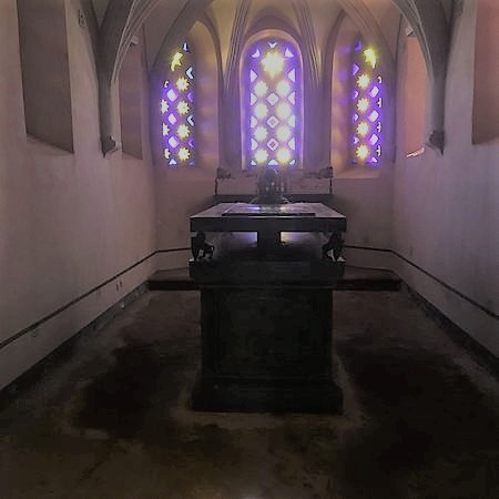 Dočasný hrob Jana Lucemburského (hrad Klause Kastel, Německo)